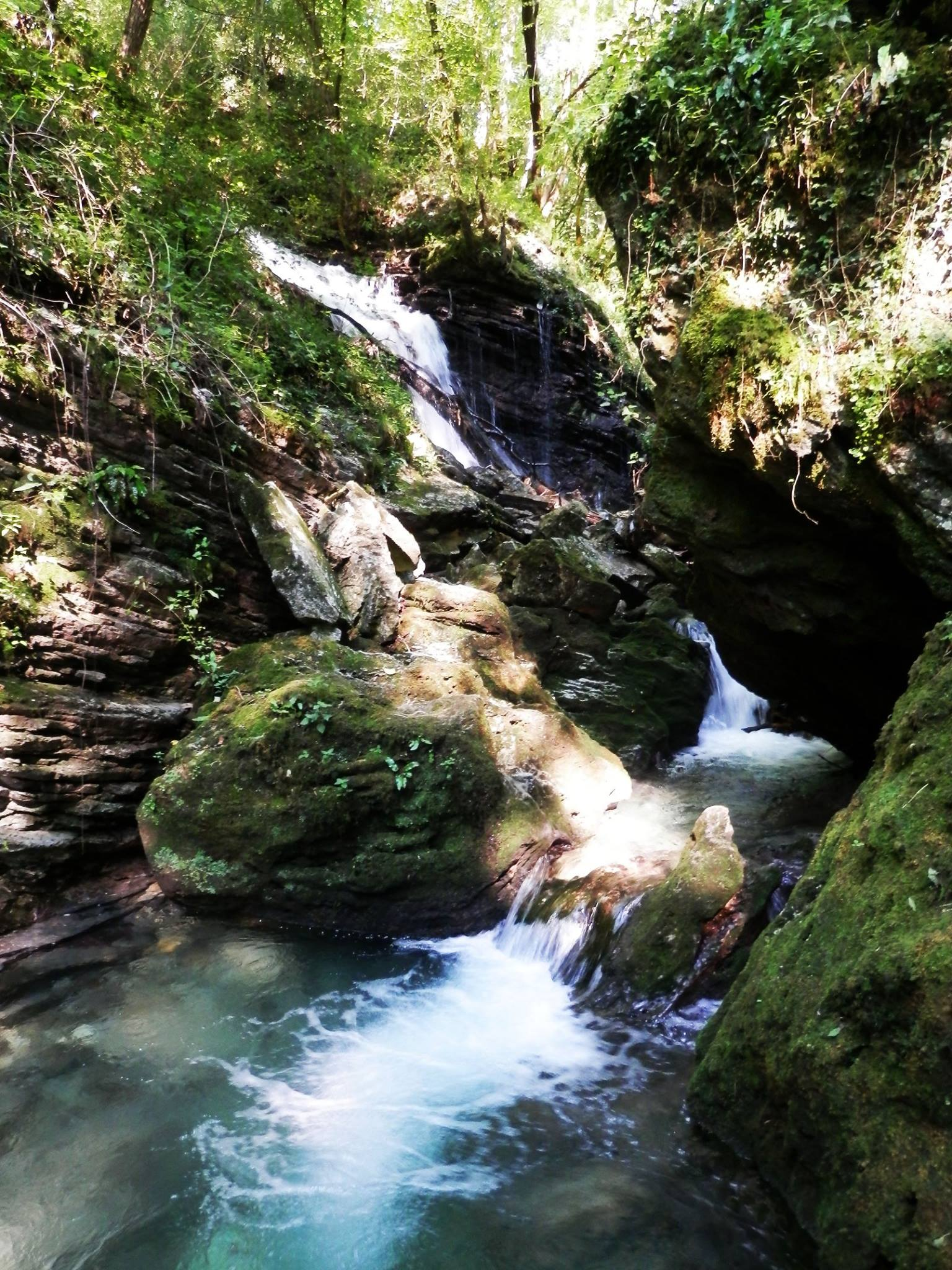 Ponte del diavolo, torrente Tinella, Morosolo (comune di Casciago), in provincia di Varese.